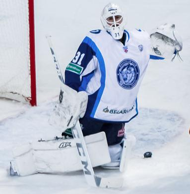 Вратарь минского «Динамо» Дэнни Тэйлор во время матча чемпионата КХЛ против хабаровского «Амура» 5 ноября 2014 года.